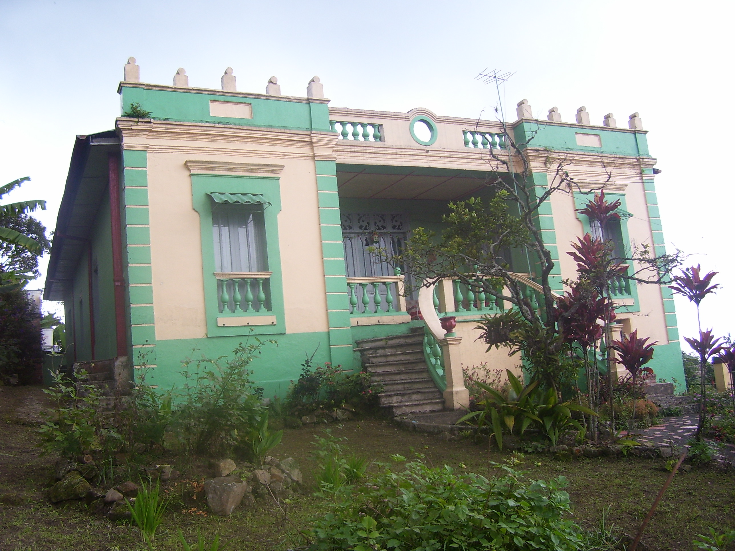 Casa antigua ubicada en la parte baja de cachipay cundinamarca.